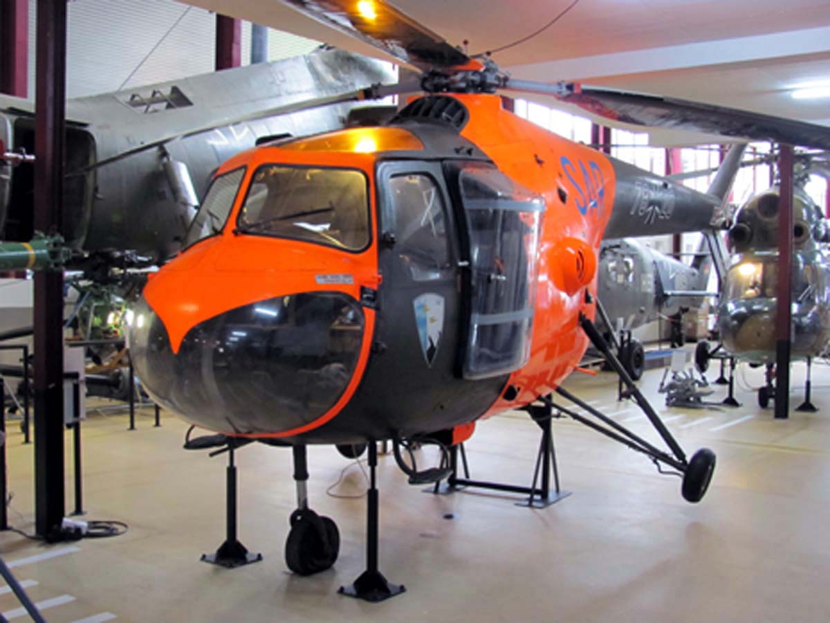 Bristol 171 Mk.52 Sycamore der Luftwaffe der Bundeswehr im Hubschraubermuseum Bückeburg